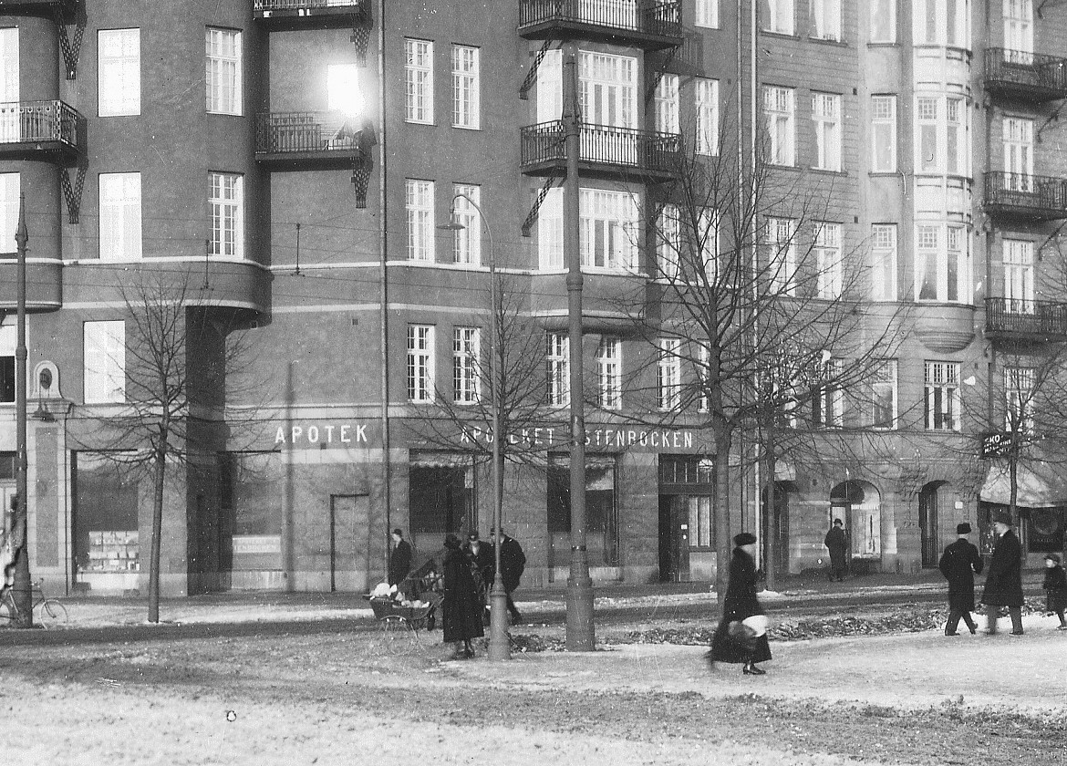 Odengatan 106, Apoteket Stenbocken till höger